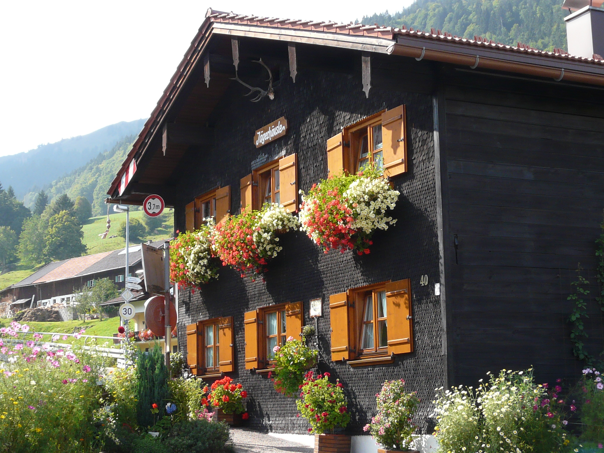 Talstr. 40 in Gunzesried, Blaichach